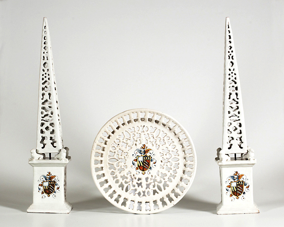 Obelischi e crespina traforati. Stile compendiario. Faenza fine del XVI secolo